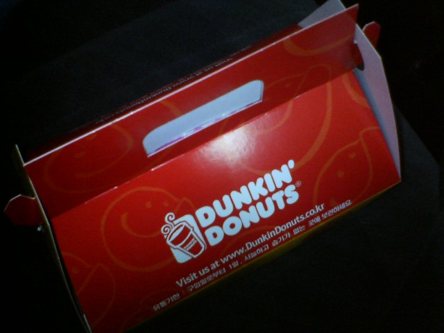 던킨도너츠 박스 윗부분.